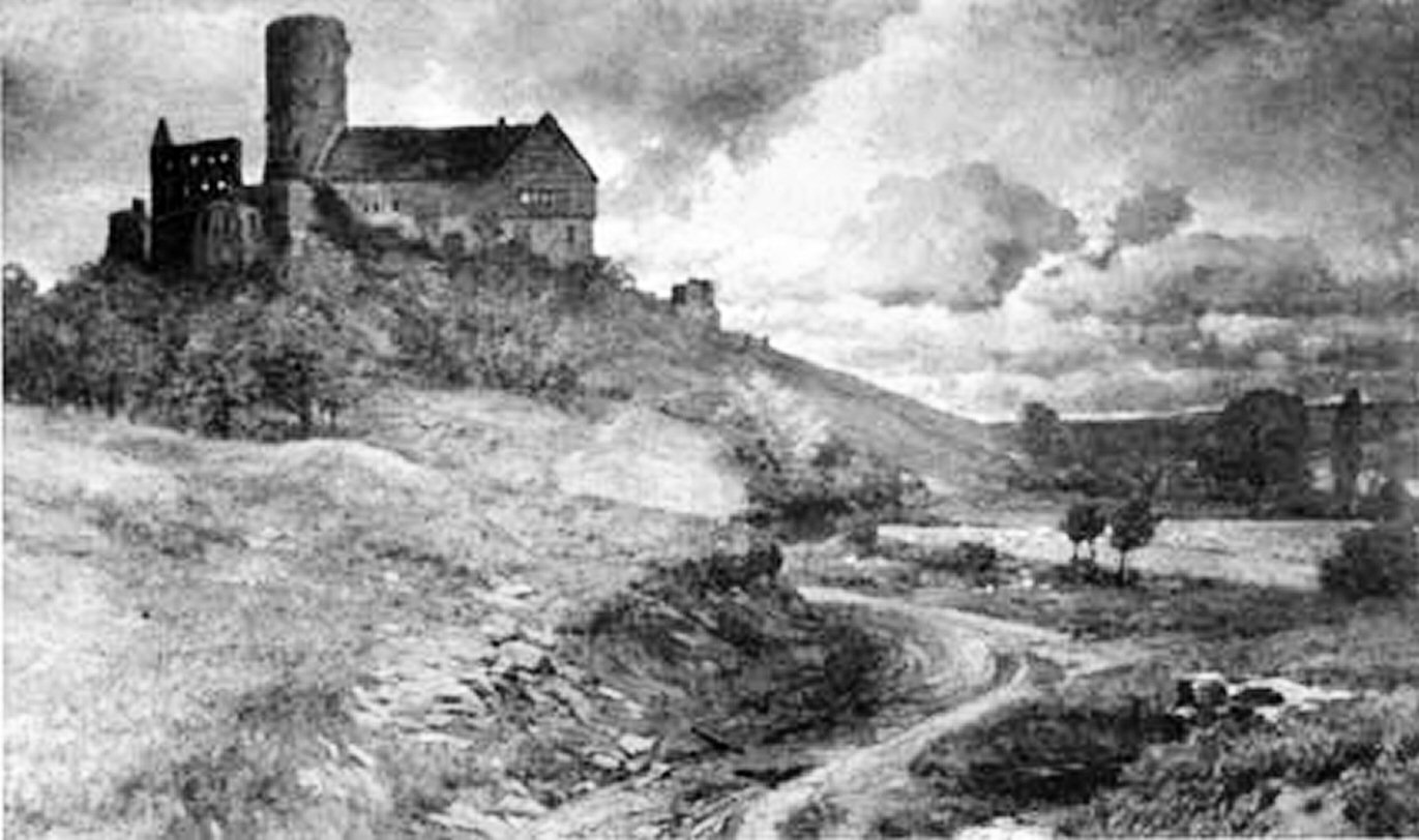 Burg Gleiberg im Jahre 1892 nach einem Ölgemälde von F. v. Wille